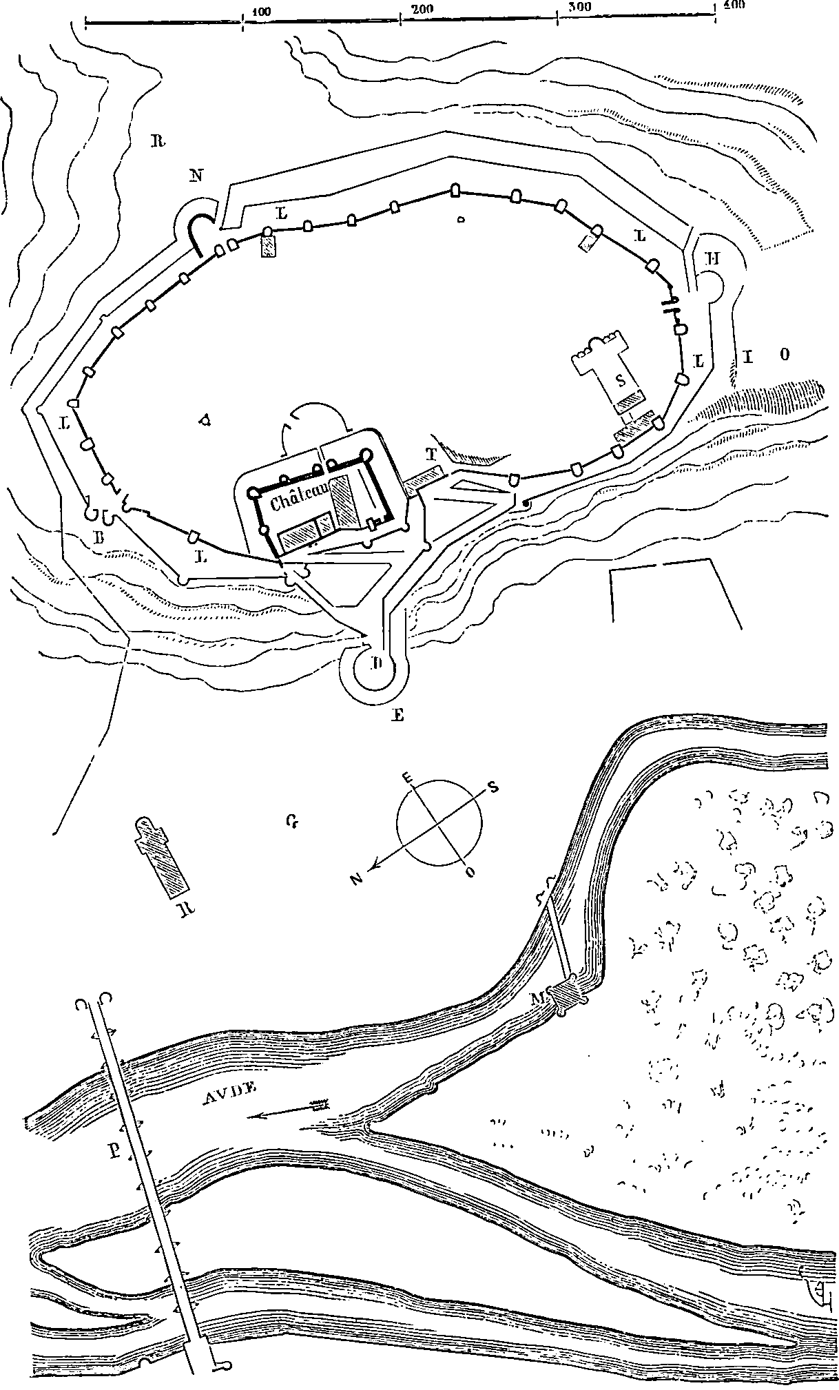 Dessin extrait de l'ouvrage La cité de Carcassonne par Eugène Viollet-le-Duc. Le dessin est intitulé : Figure N°2. Notice Gallica : Type : texte imprimé, monographie Auteur(s) : Viollet-le-Duc, Eugène-Emmanuel (1814-1879). Auteur du texte Titre(s) : La cité de Carcassonne (Aude) [Texte imprimé] / par Viollet Le Duc Publication : Paris : Librairie des imprimeries réunies, 1888 Description matérielle : 85 p. : ill. ; in-8 Sujet(s) : Carcassonne (Aude) -- Cité -- Histoire Notice n° : FRBNF36570974